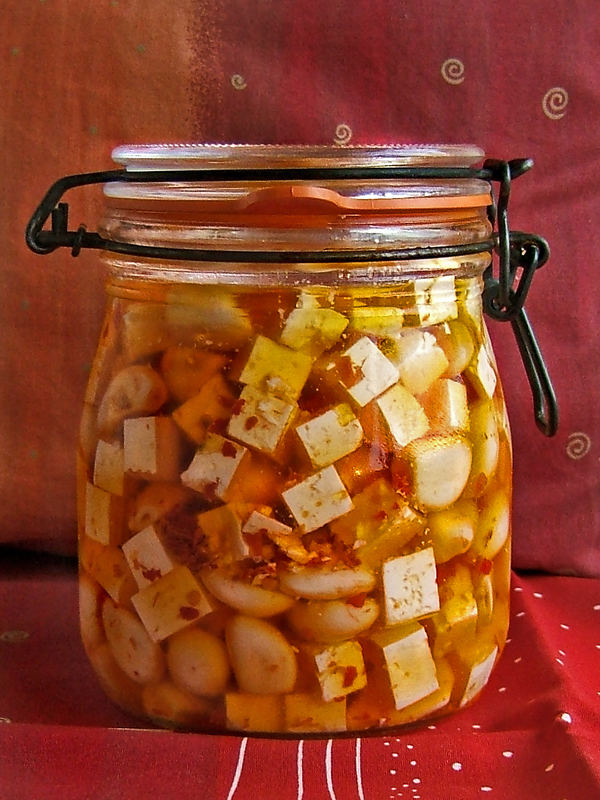 mit Knoblauch und Chili eingelegter Feta